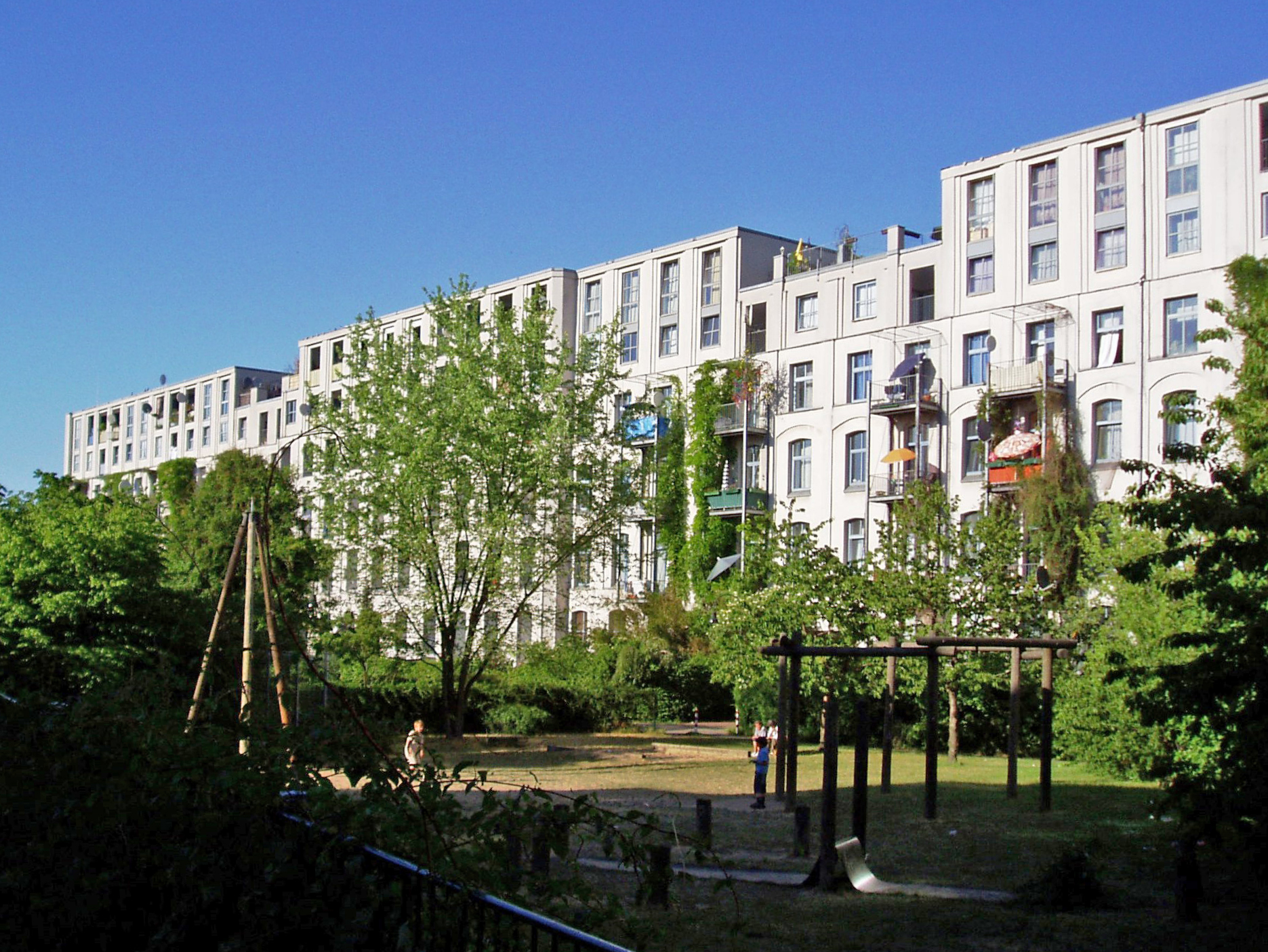 Anno-Riegel, Cologne